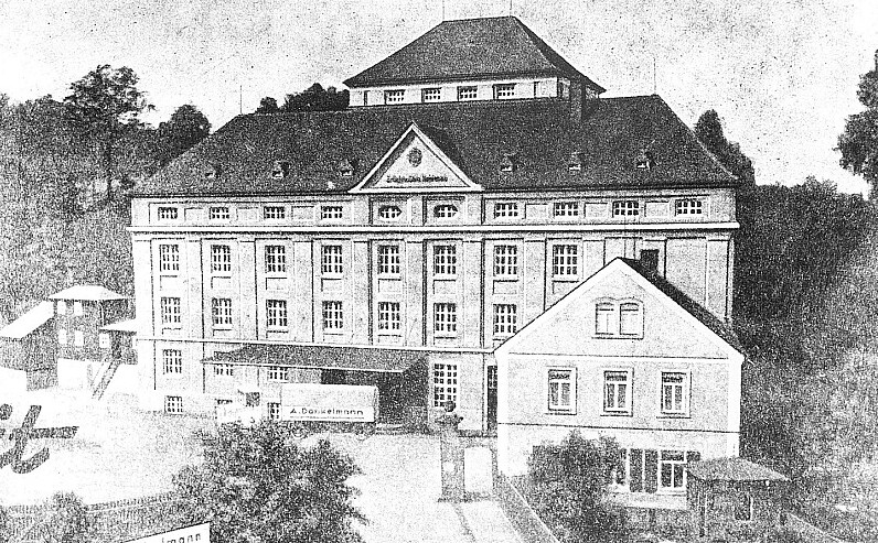 Original image description from the Deutsche Fotothek Heidenau. Erlichtmühle oder Mühlenwerke Heidenau, A. Dankelmann, aus: Die Mühle vom 13. Mai 1938